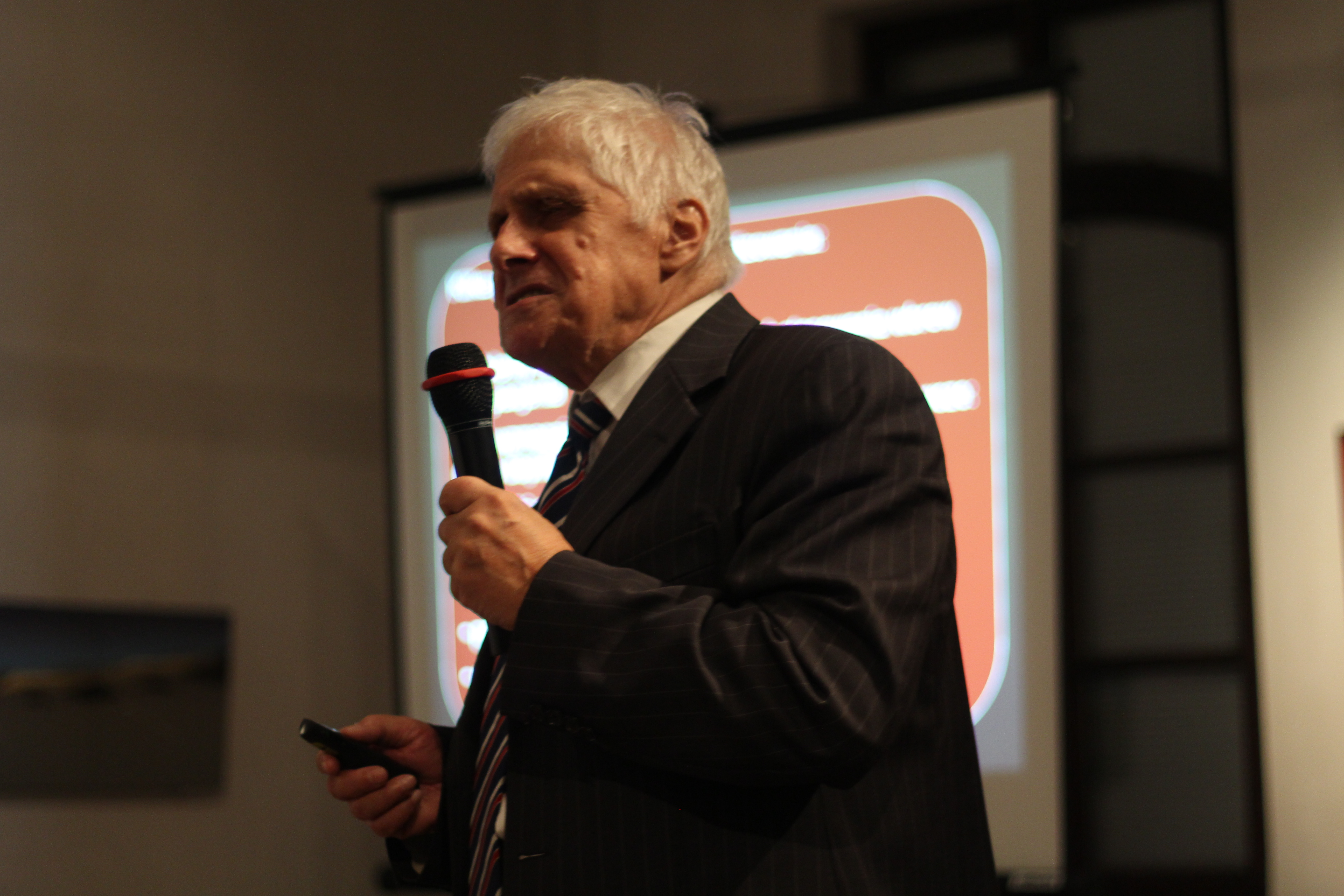 Jerzy Vetulani (2013).